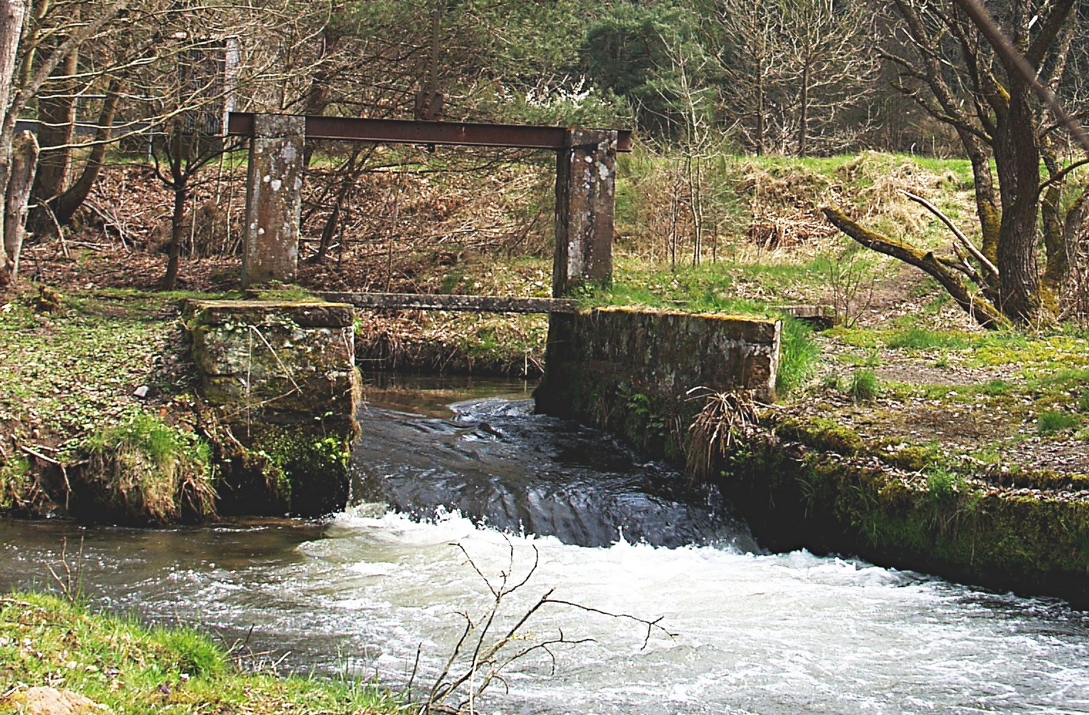 gut erhaltenes Triftwehr mit Umleitung auf der Wieslauter zwischen Hinterweidenthal und Dahn